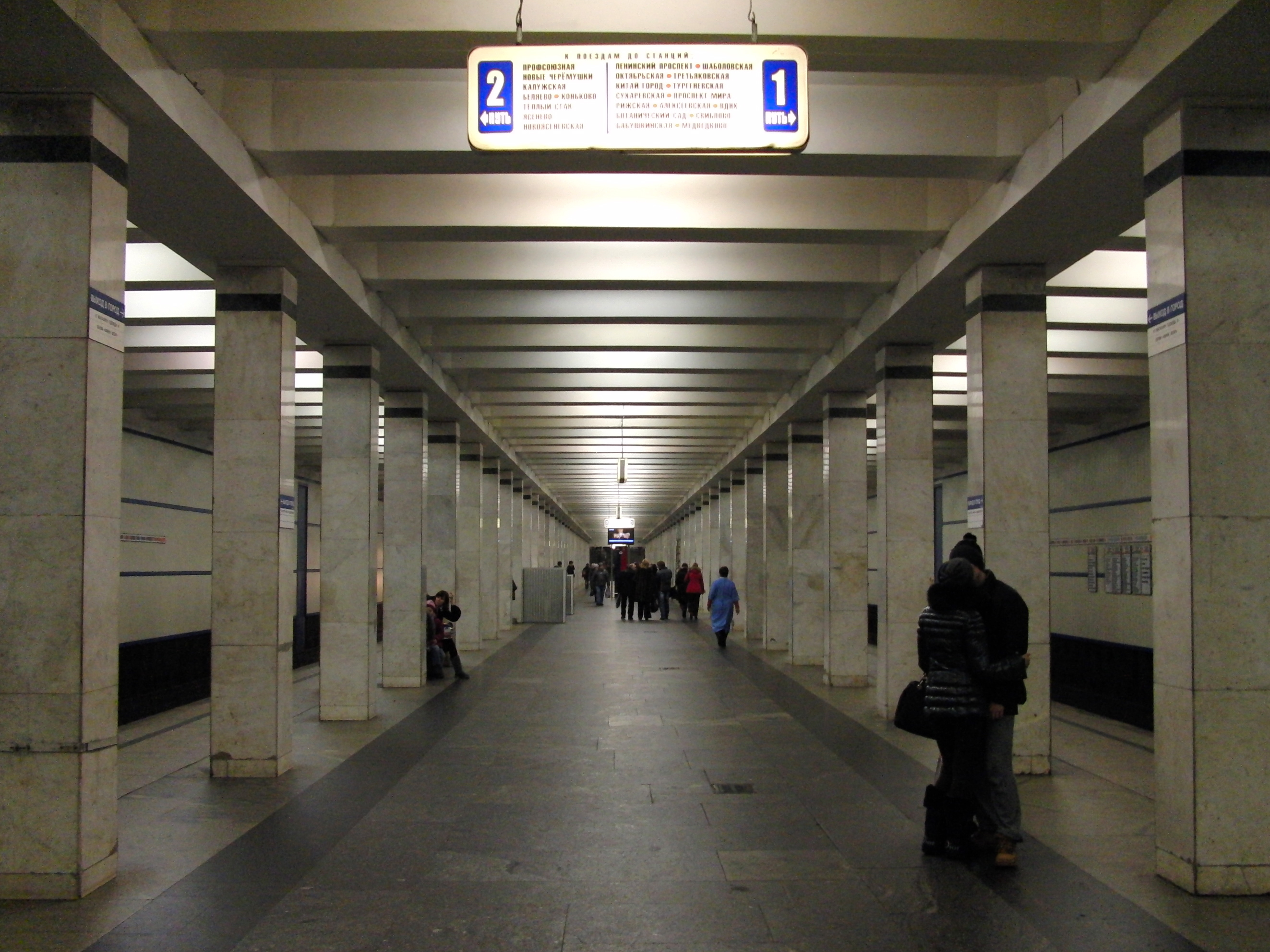 Akademicheskaya (Академическая)